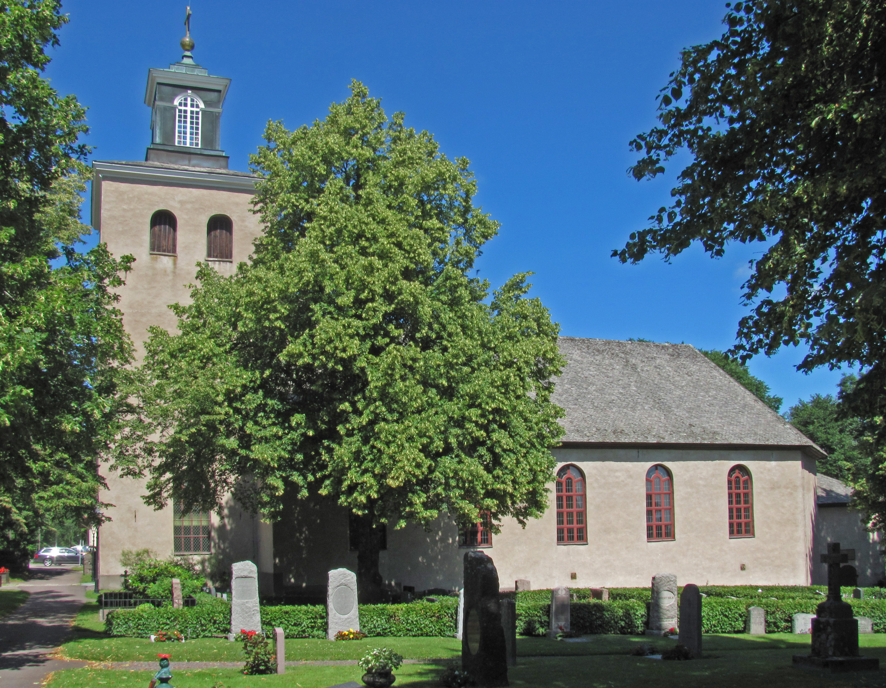 Eds kyrka, Grums, från söder